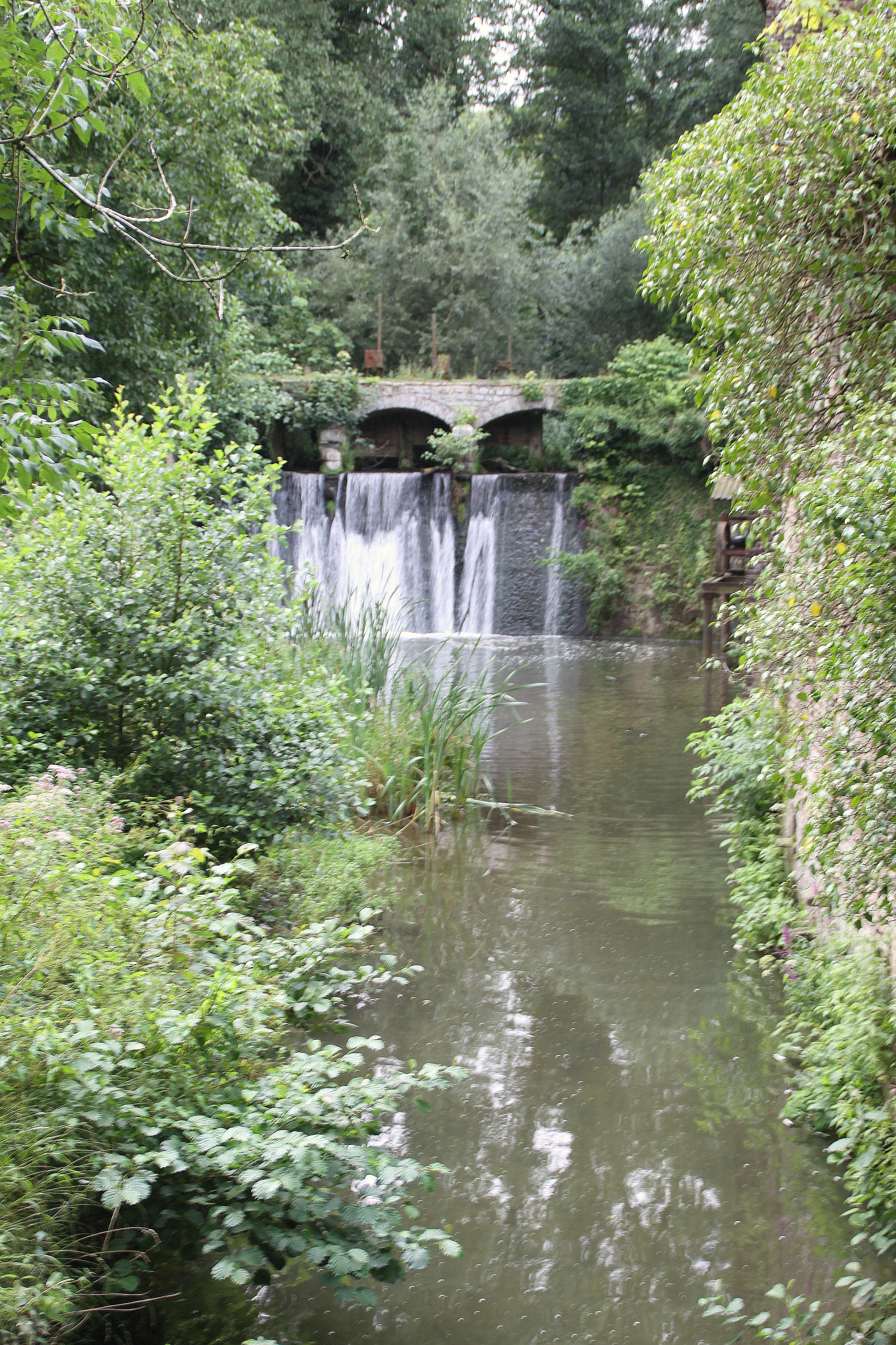 Den Obrecheuil bei der Mille vu Saint-Denis